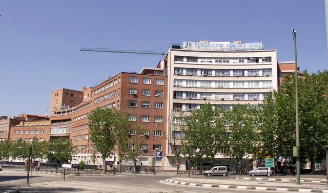 Clínica de la Concepción - Fundación Jiménez Díaz. Plaza de Cristo Rey, Madrid. Antiguo Instituto de Investigación Clínica y Médica del Dr. Jiménez Díaz. Obra de Antonio Cámara Niño y José Manuel Bringas Vega entre 1949 y 1953. Adaptación para Clínica de la Concepción entre 1953 y 1955.